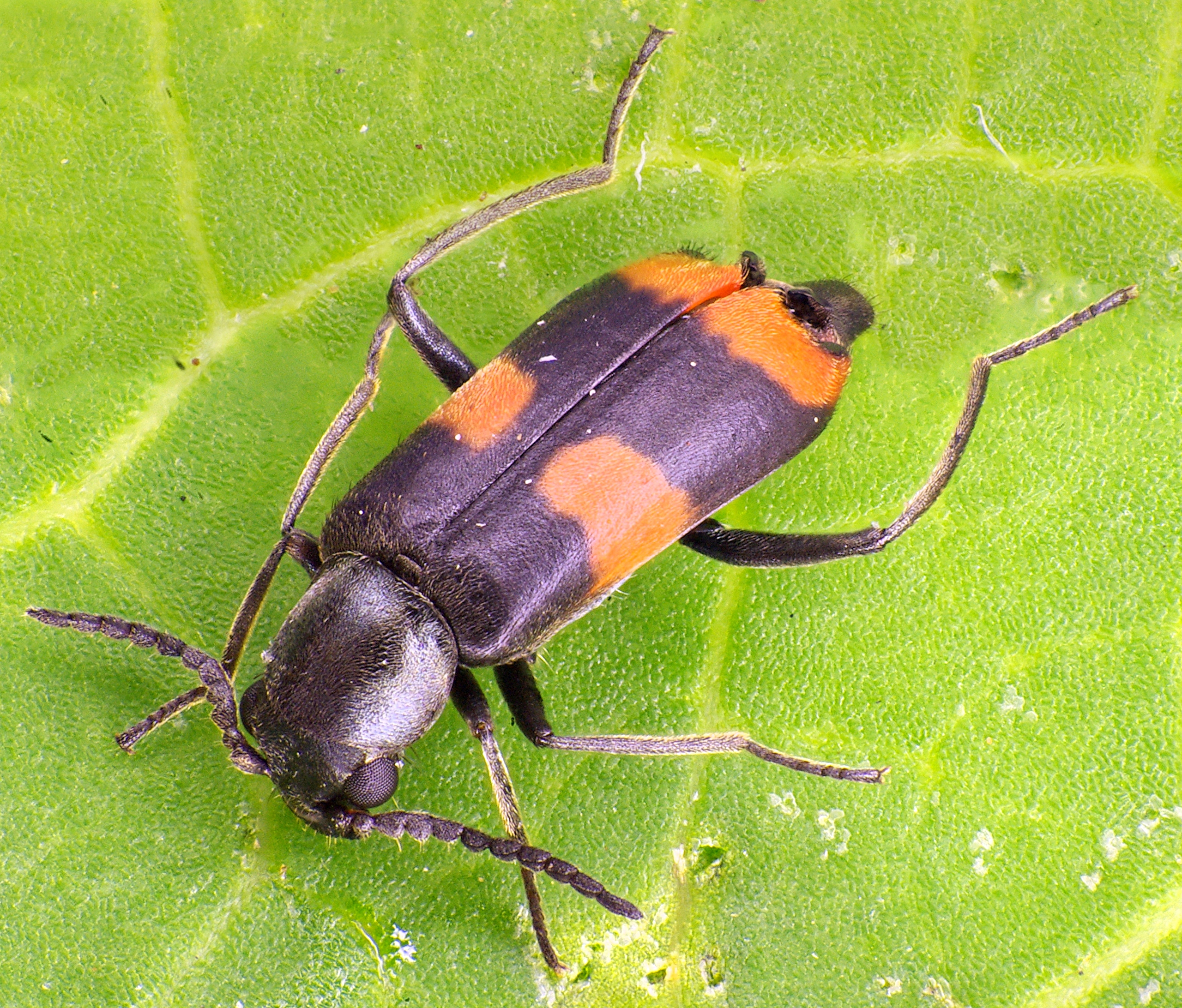 Anthocomus fasciatus aus Süddeutschland, Baden-Württemberg, zwischen Tuttlingen und Rottweil, 700 m Männchen